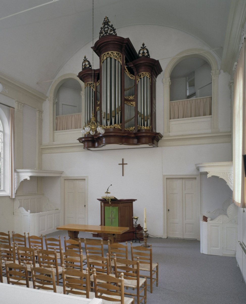 Kerkgebouw Verenigde Christelijke Gemeente: Interieur, aanzicht orgel, orgelnummer 356 (opmerking: Gefotografeerd voor Het Historische Orgel in Nederland 1850-1858)